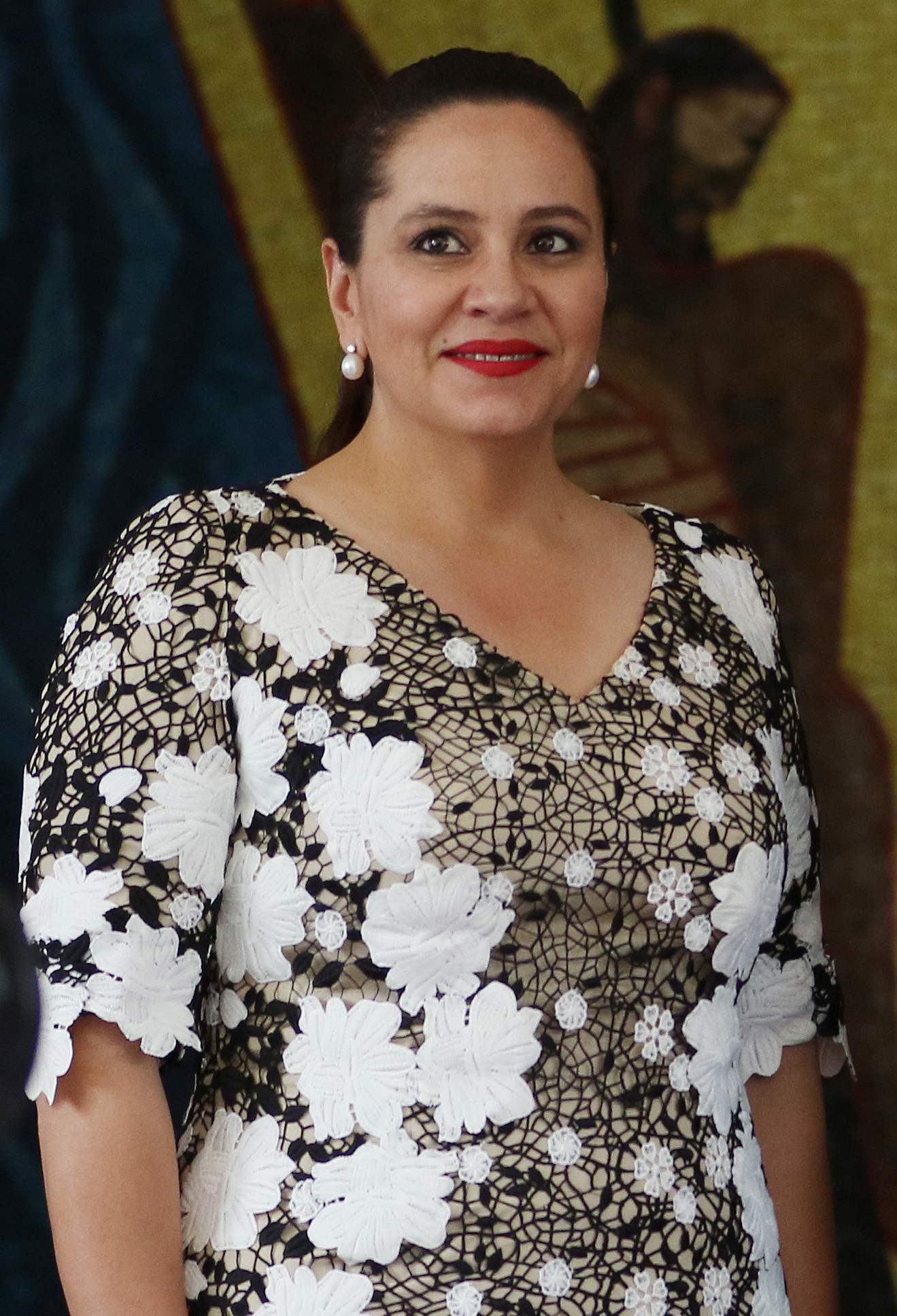 Quito, 13 octubre de 2017 (Andes).- El presidente hondureño, Juan Orlando Hernández (i.), y el de Ecuador, Lenín Moreno, renovaron este viernes su compromiso para impulsar las negociaciones y alcanzar “a la mayor brevedad posible” un acuerdo parcial de complementación económica entre ambos países. ANDES/Micaela Ayala V.